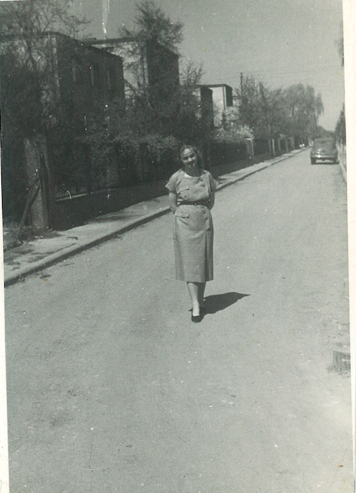 ul. Podkomorska w Poznaniu, około 1955 r.